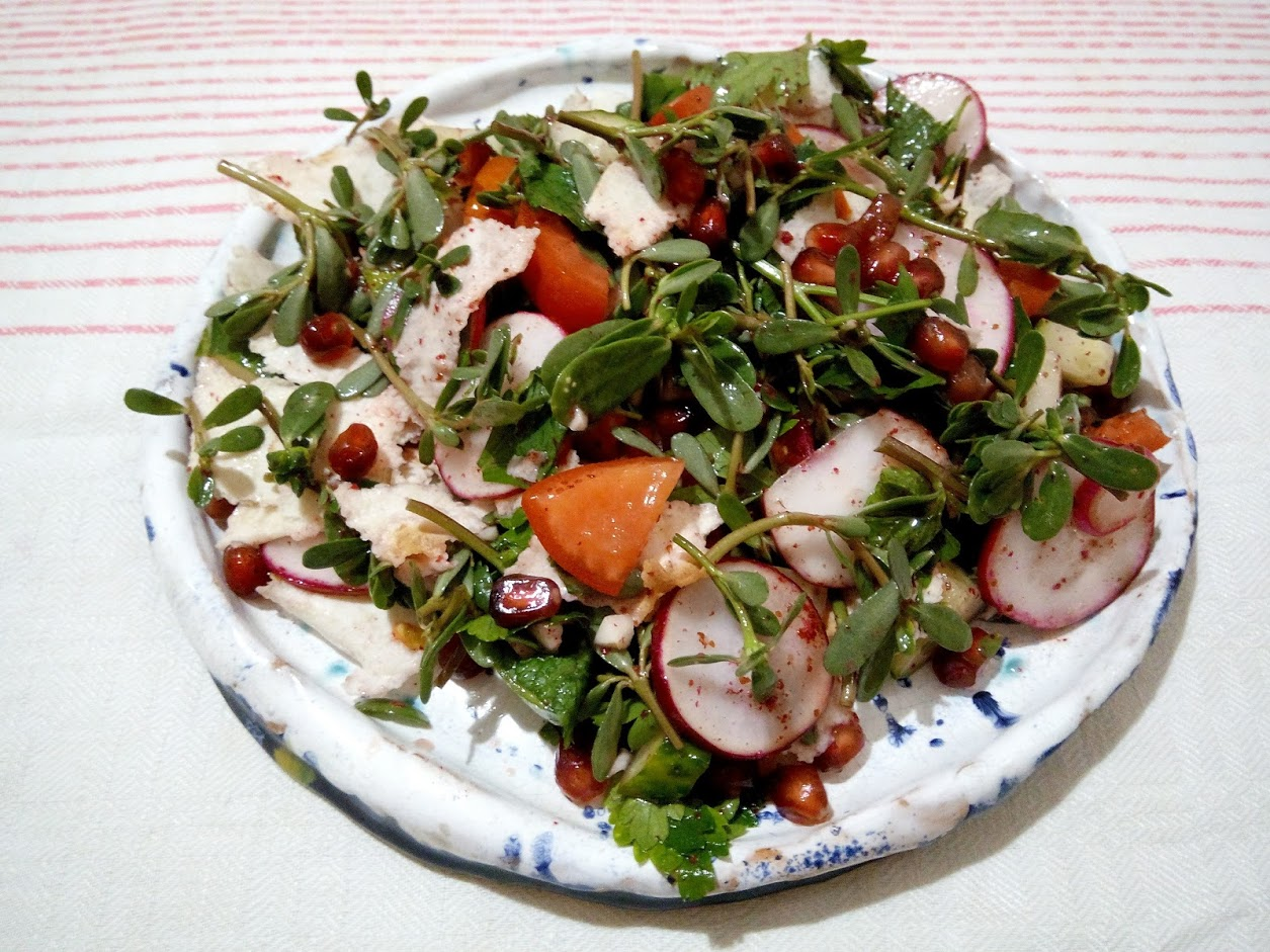 Салат фаттуш з портулаком городнім